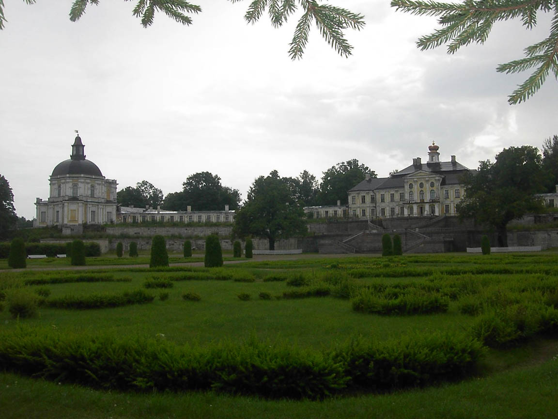 Grand Oraniebaum Palace, Lomonosov town (Saint Petersburg, Russia)